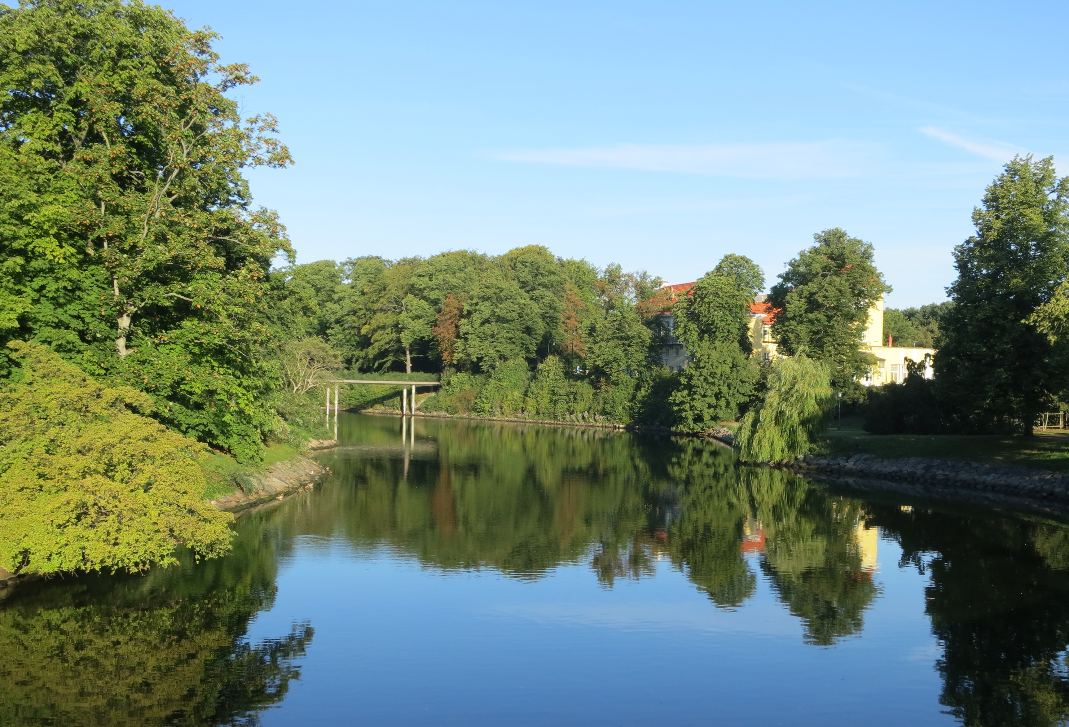 Parkkanalen vid Kungsparken